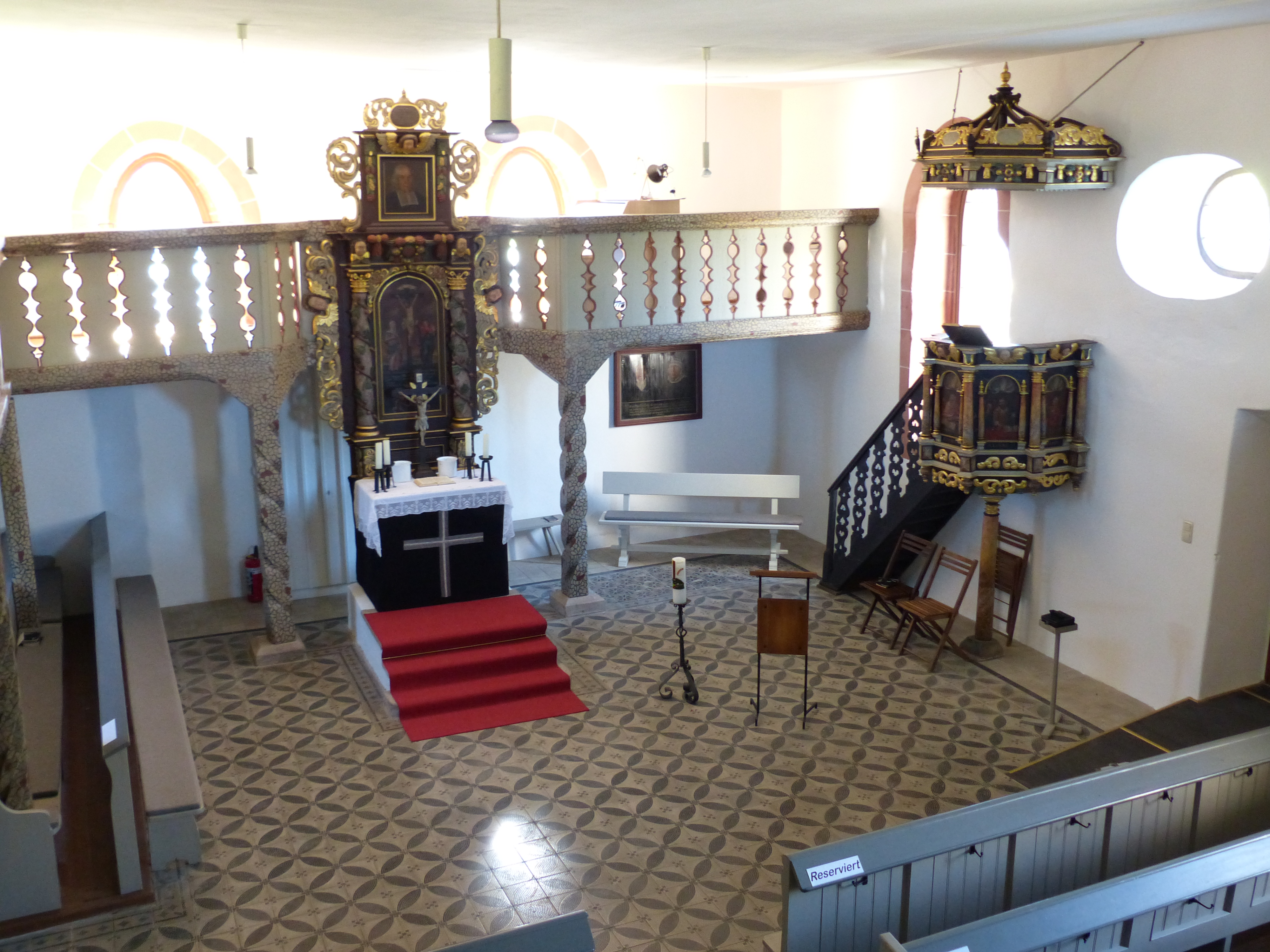 Innenausstattung der Stammbacher Friedhofskirche